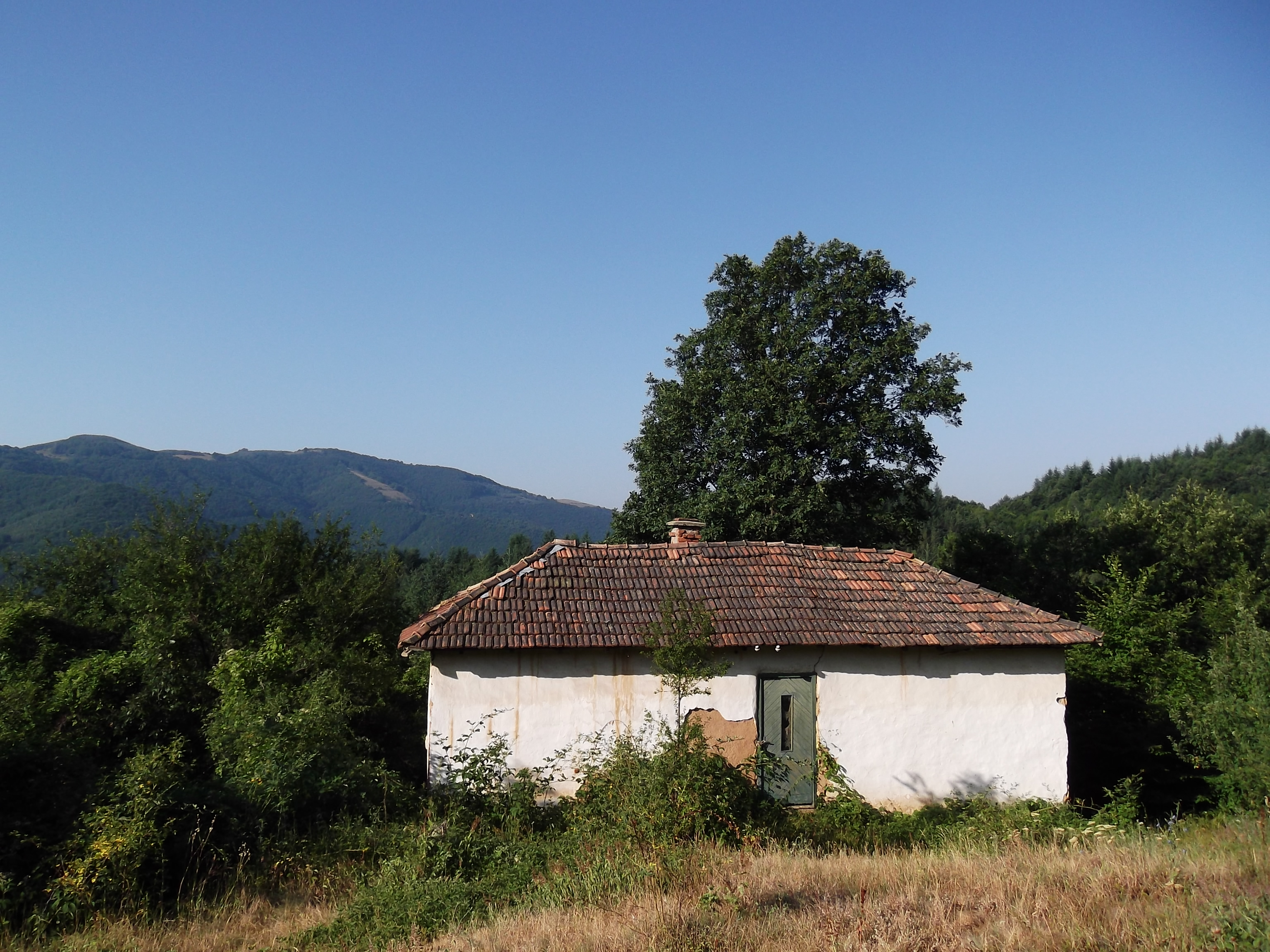 Къща в махала Бальова сеч, Лесковдол.